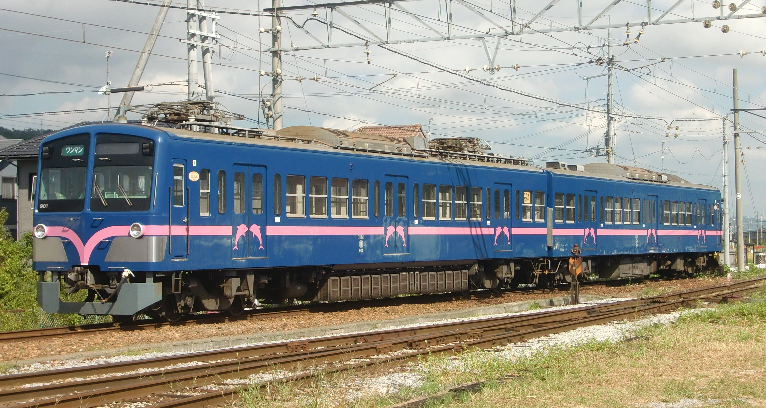 近江鉄道900形（敷地外より撮影）